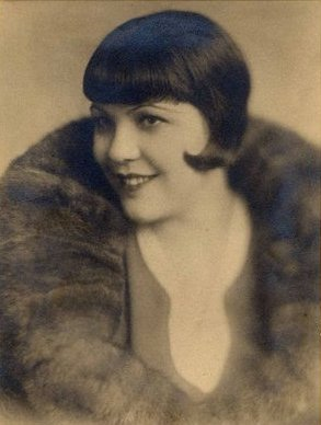 Tőkés Anna (1903-1966) kb. 20 éves korában